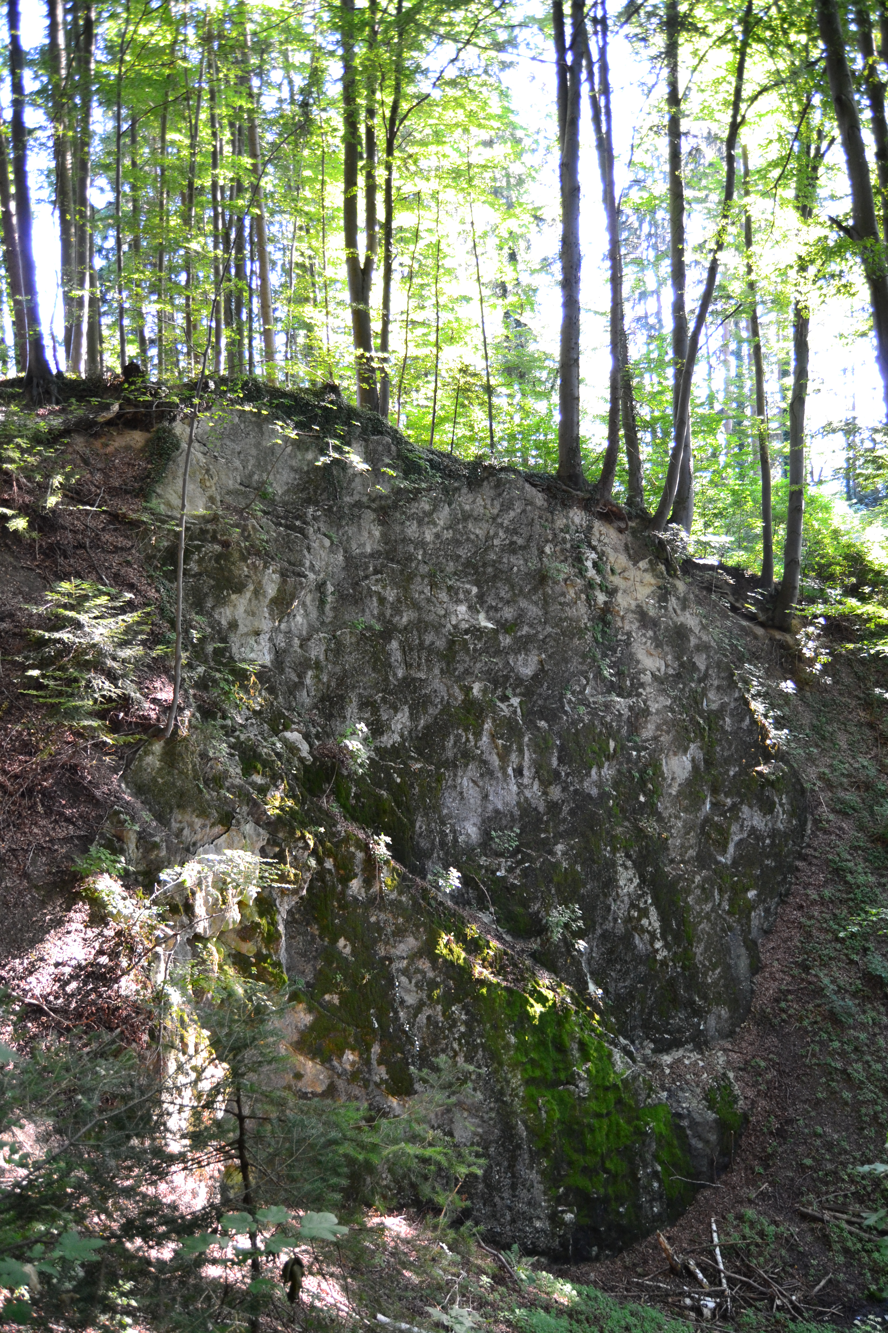 Aufschluss von Osten